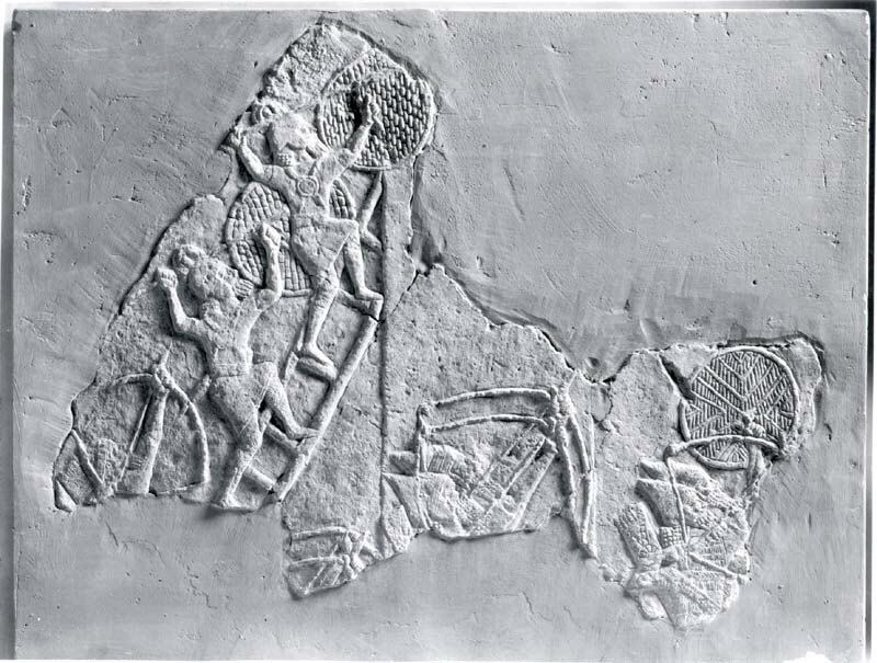 Assyrian; Relief; Stone-Reliefs